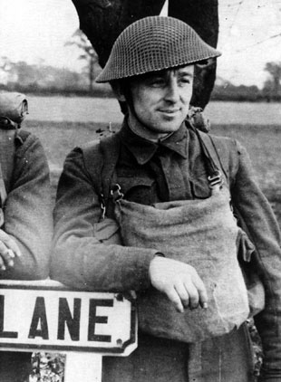 Antonín Bartoš, příslušník výsadku Clay